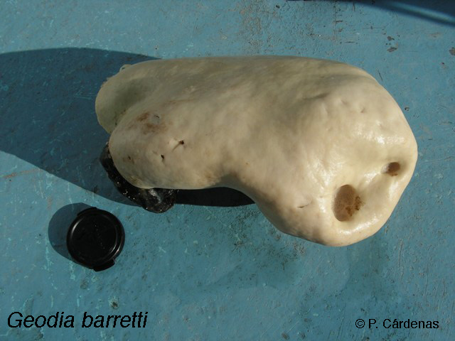 Geodia barretti, Korsfjord, Norvège